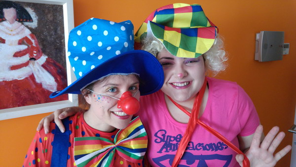 payasas